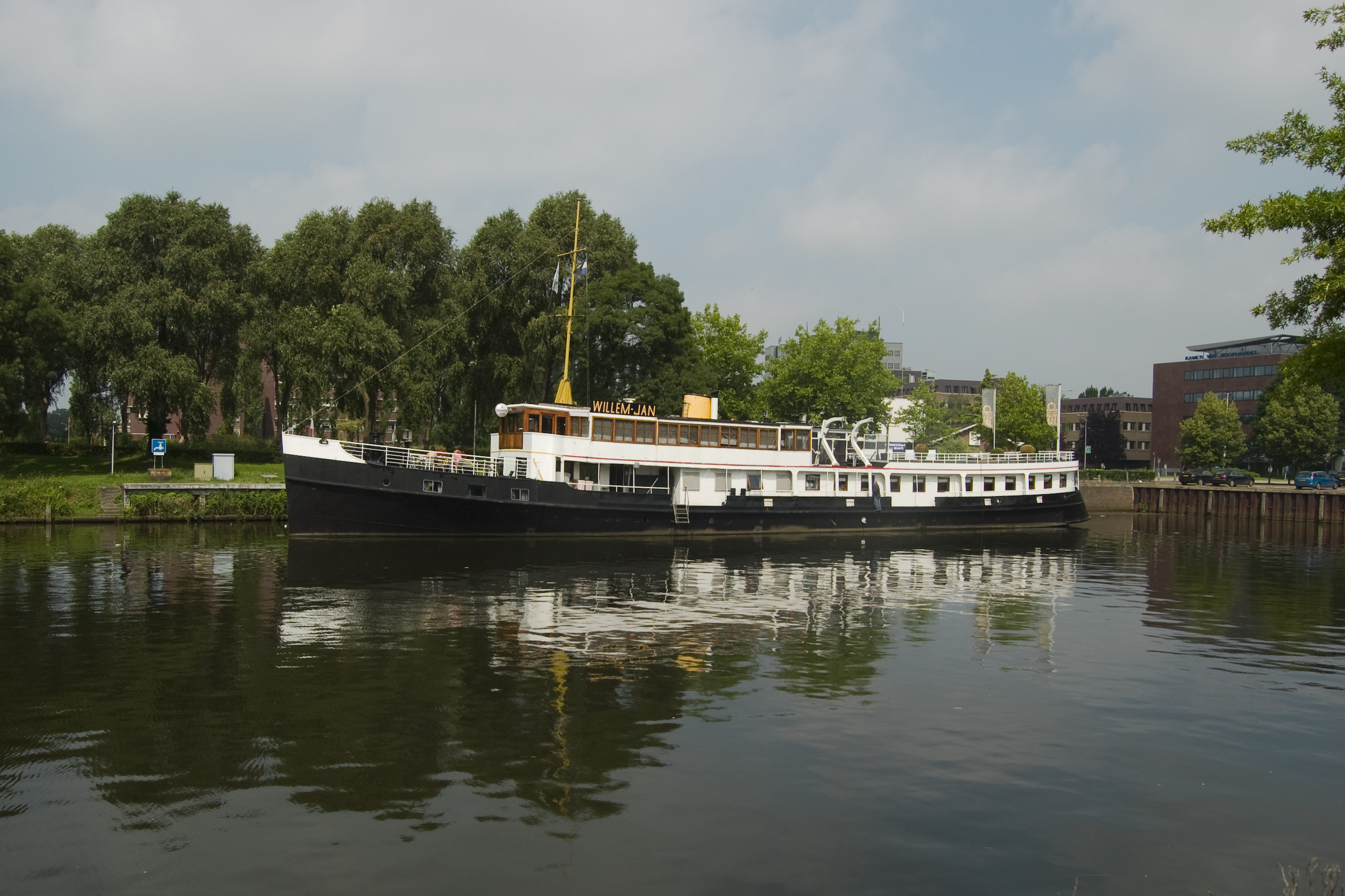 De voormalige veerboot Oosterschelde uit 1933 van de PSD.